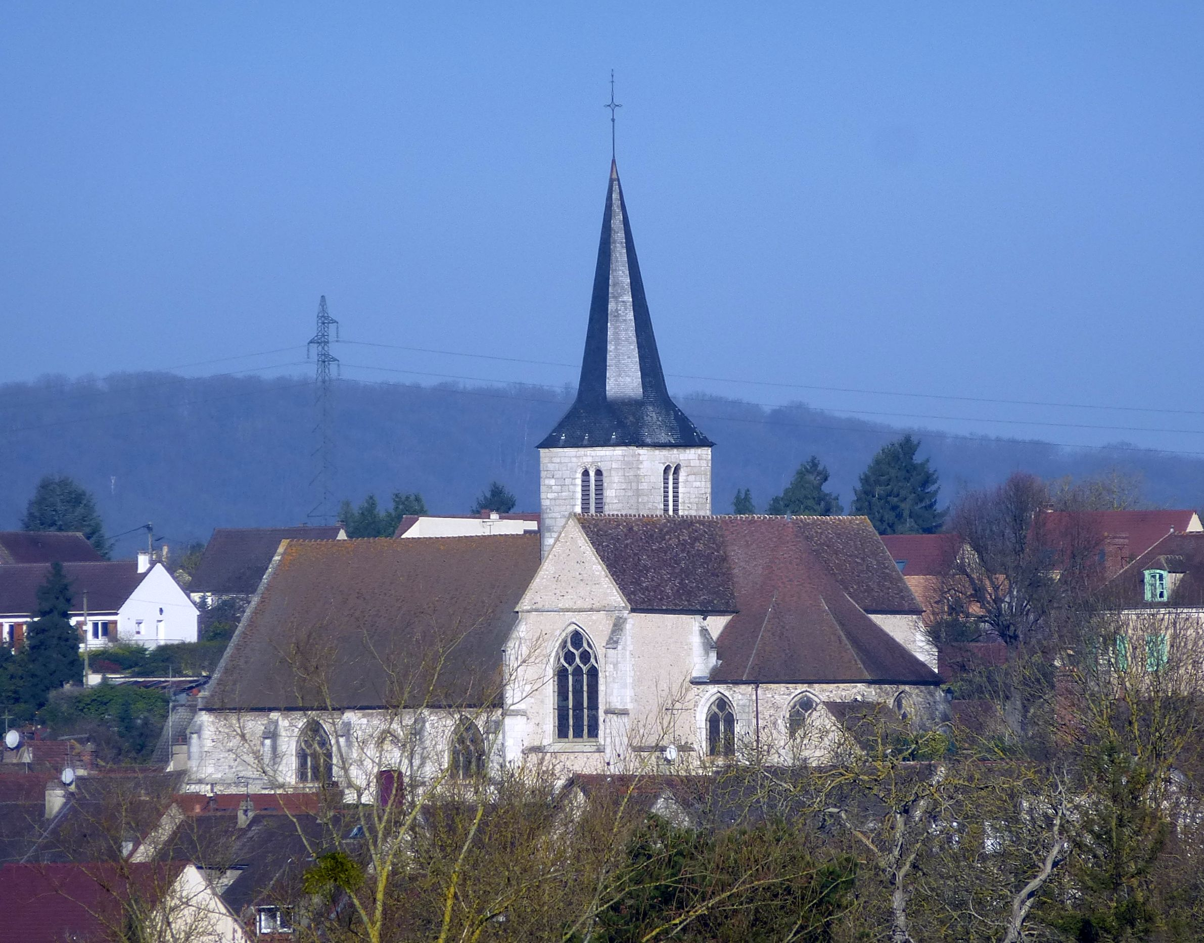 Église Saint-Ouen de Bennecourt. (département des Yvelines, région Île-de-France).